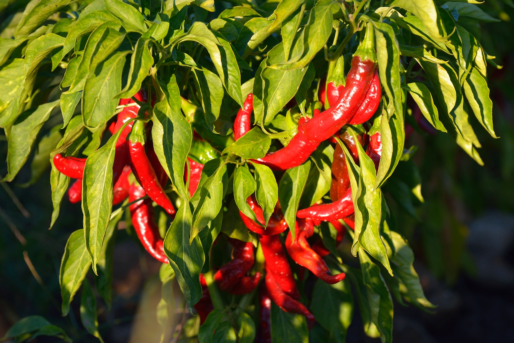 Pimientos para la elaboración de pimentón ahumado de Candeleda